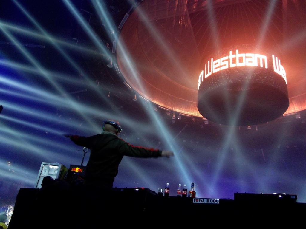 Zdjęcie zrobione podczas Mayday 2011 w katowickim Spodku.